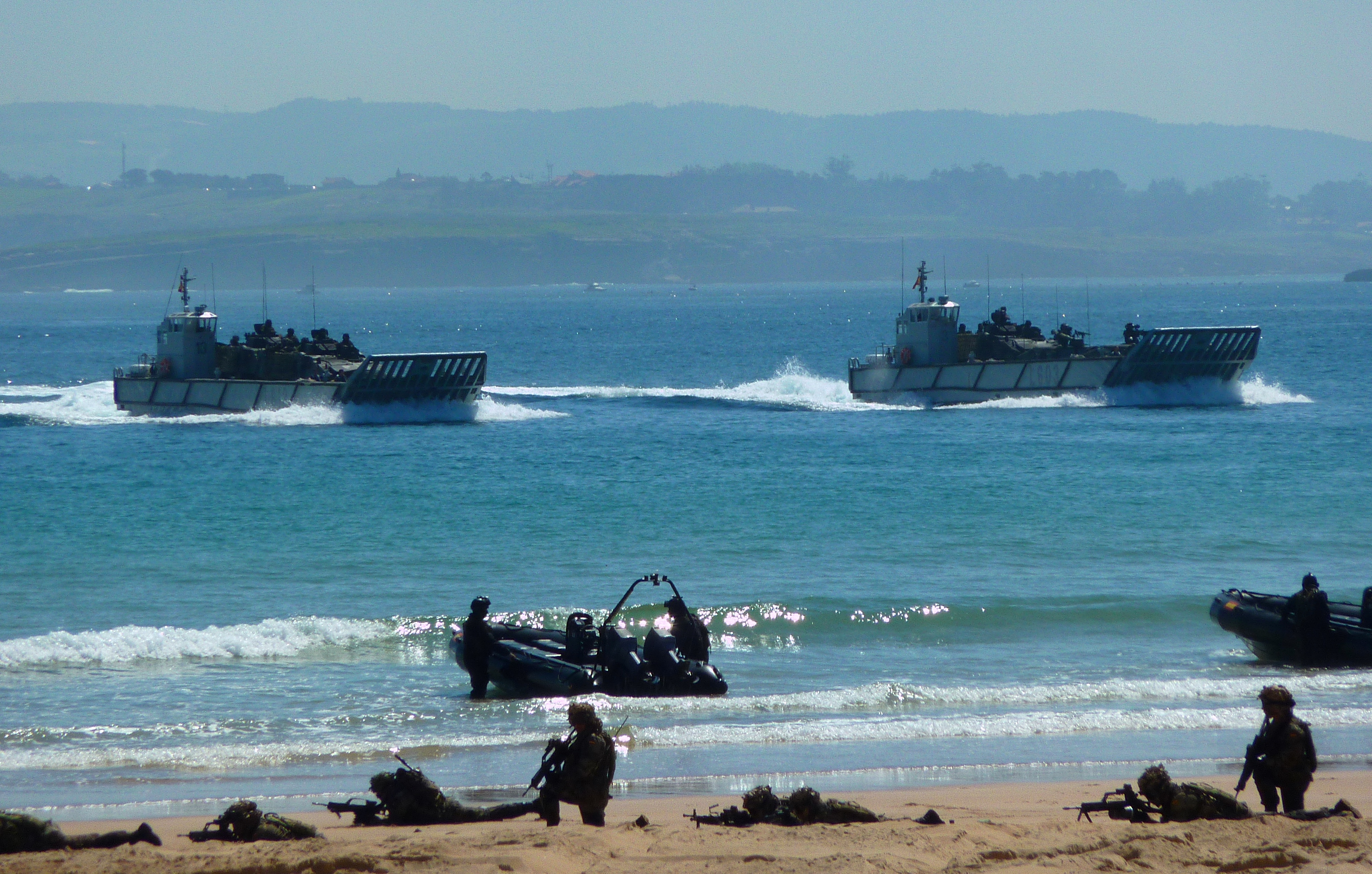 Lanchas de desembarco clase LCM-1E de la Armada Española.